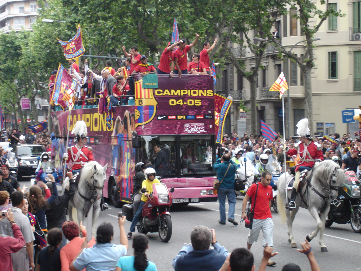 Celebración del título de Liga de Primera División de España 2004-2005, por el FC Barcelona.